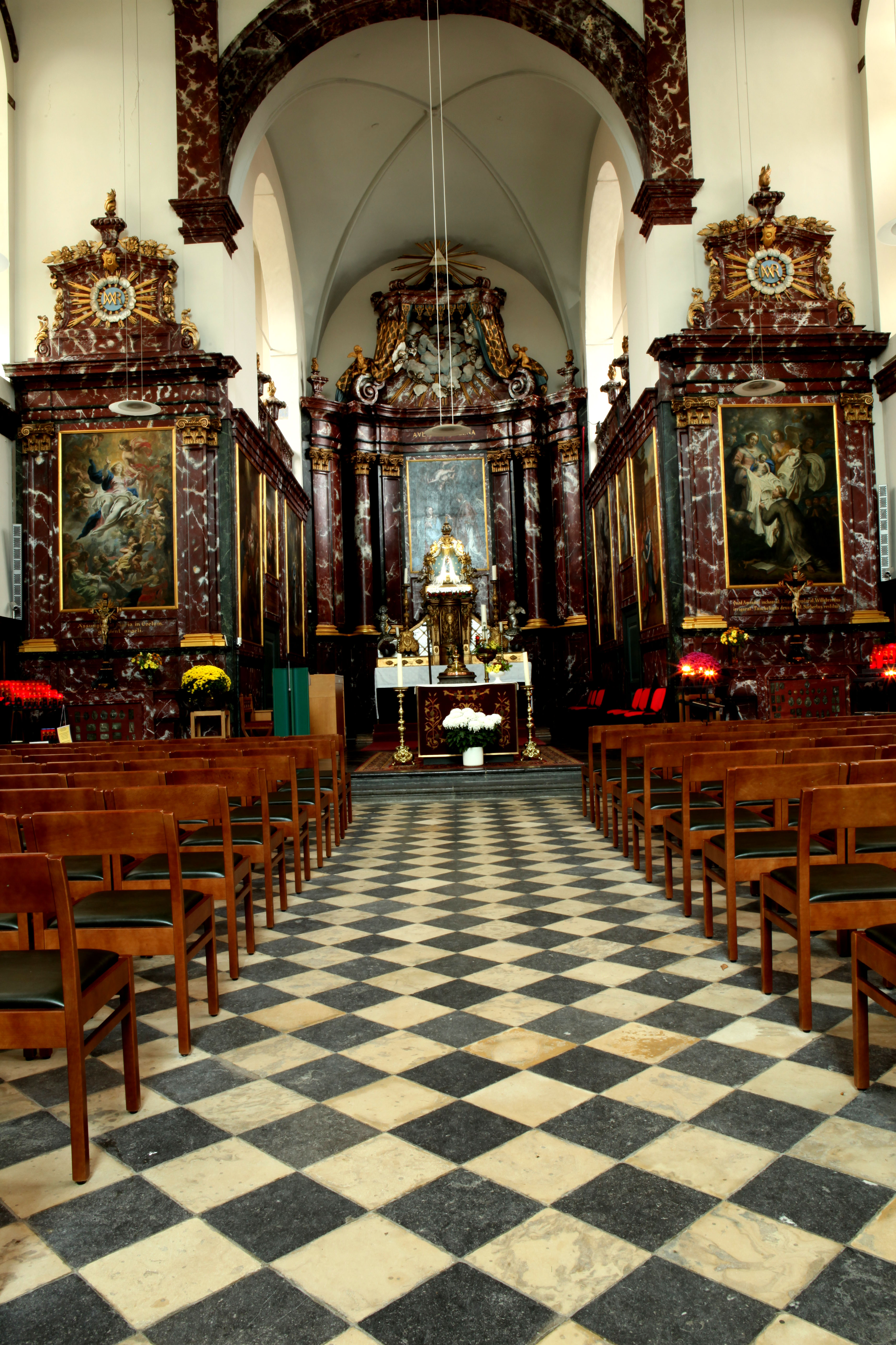 Intérieur de l'église Notre-Dame-au-Bois de Jezus-Eik